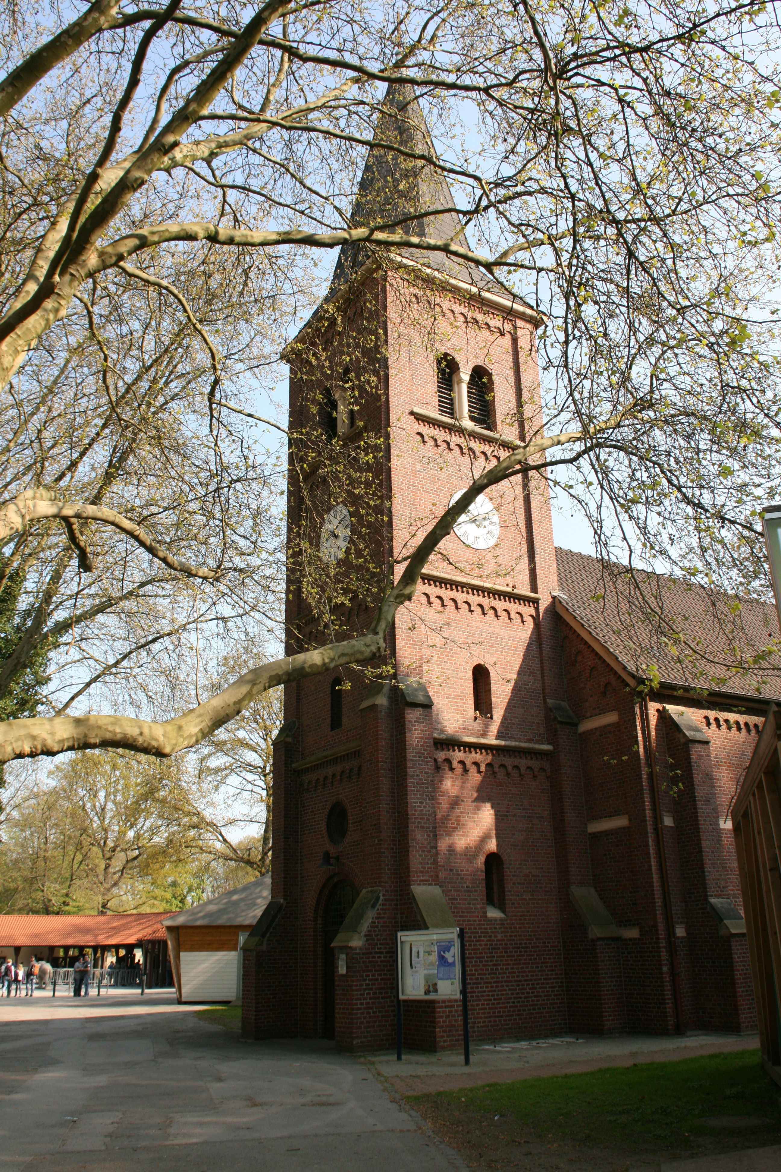 Bleckkirche, Bleckstraße 1 in Gelsenkirchen